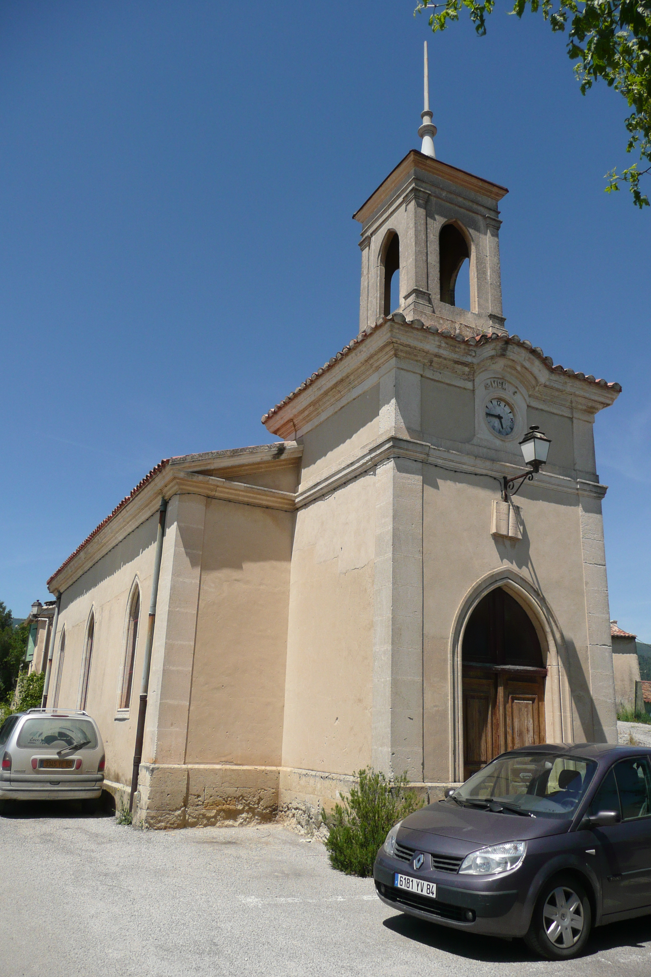 Eglise à La Motte-d'Aigues.